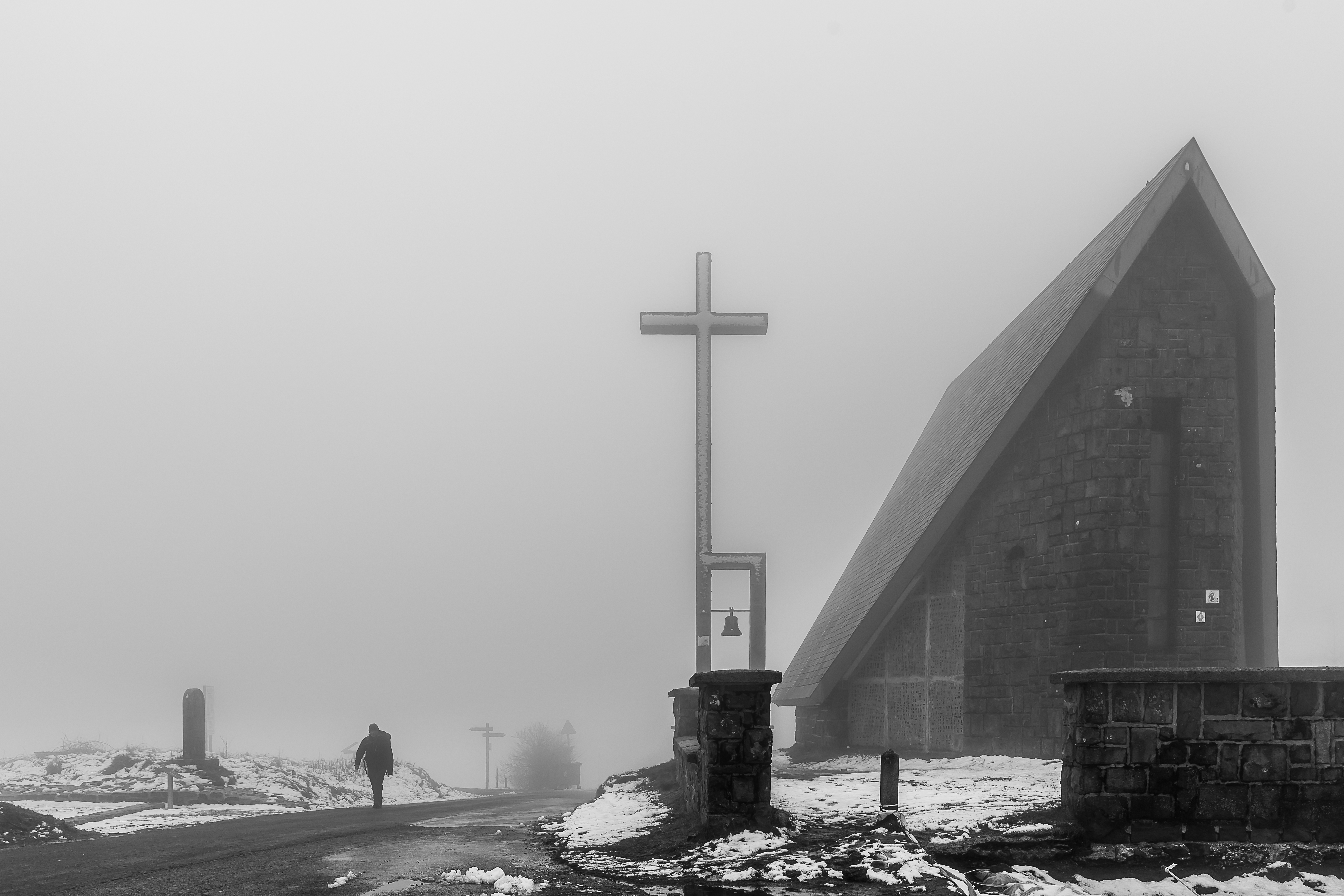 Sector comprendido entre Roncesvalles y Valcarlos